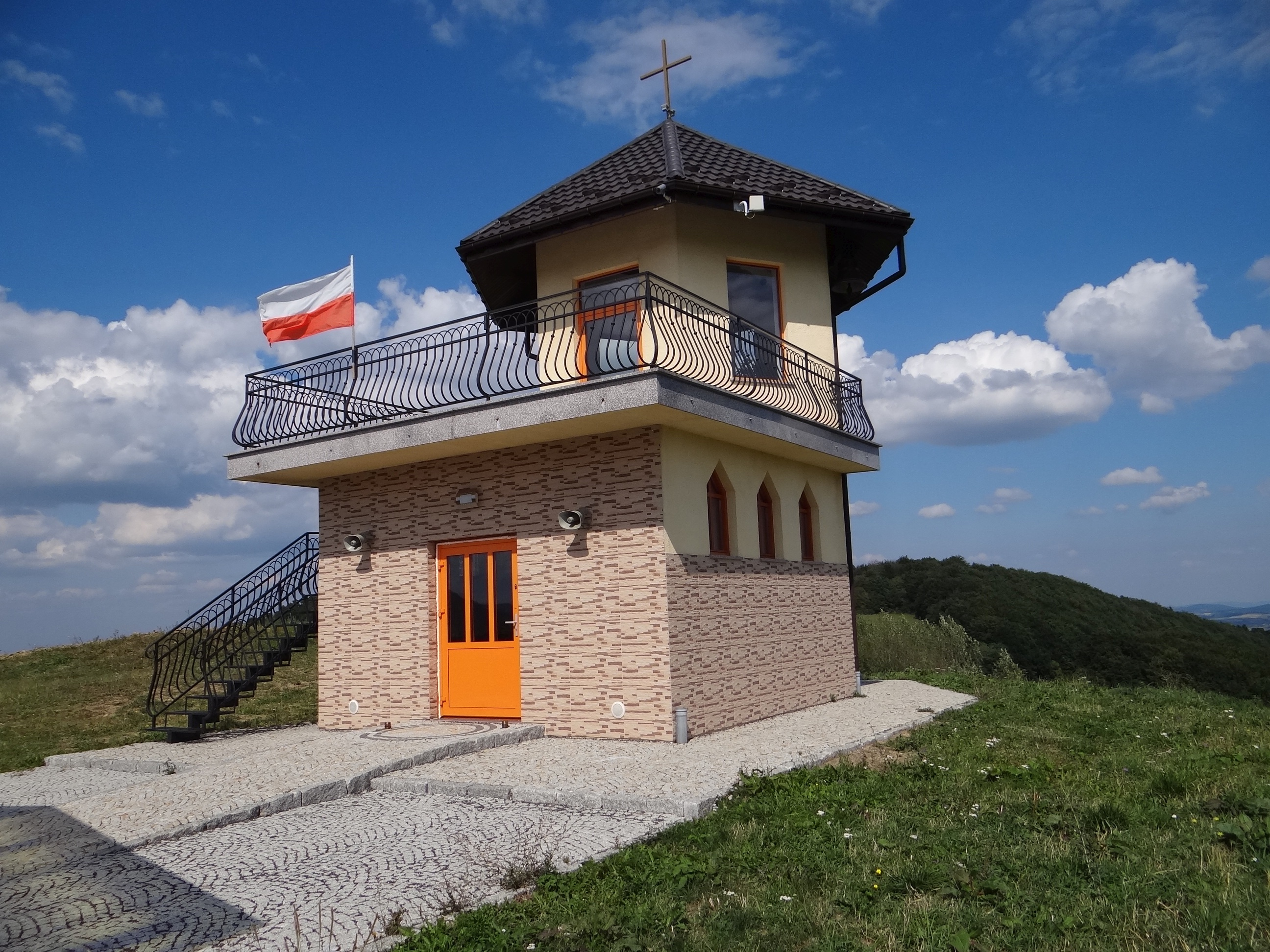 Białowodzka Góra. Nowa kaplica